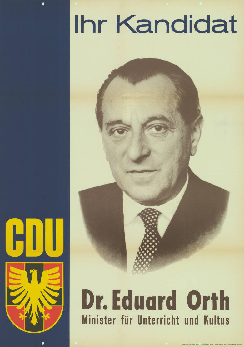 Ihr Kandidat CDU Dr. Eduard Orth Minister für Unterricht und Kultus Abbildung: Porträtfoto Kommentar: Rückseitig mit Kugelschreiber beschriftet. Plakatart: Kandidaten-/Personenplakat mit Porträt Auftraggeber: Verantw.: CDU-Bundesgeschäftsstelle Bonn Drucker_Druckart_Druckort: Repro-Druck, Schmiden bei Stuttgart Objekt-Signatur: 10-010 : 217 Bestand: Landtagswahlplakate Rheinland-Pfalz (10-010) GliederungBestand10-18: Landtagswahlplakate Rheinland-Pfalz (10-010) » CDU Lizenz: KAS/ACDP 10-010 : 217 CC-BY-SA 3.0 DE